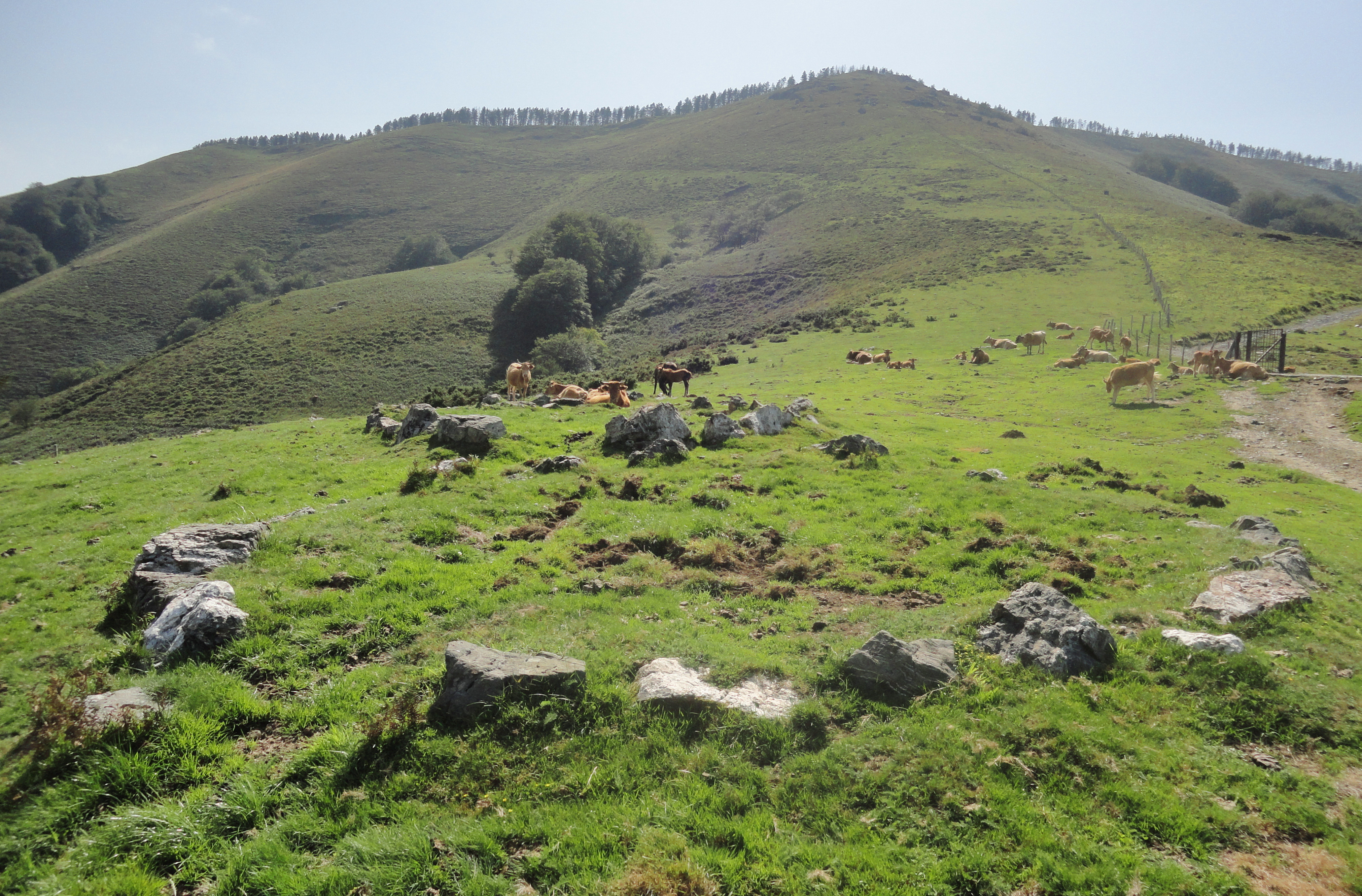 Errekaleku harrespil multzoa